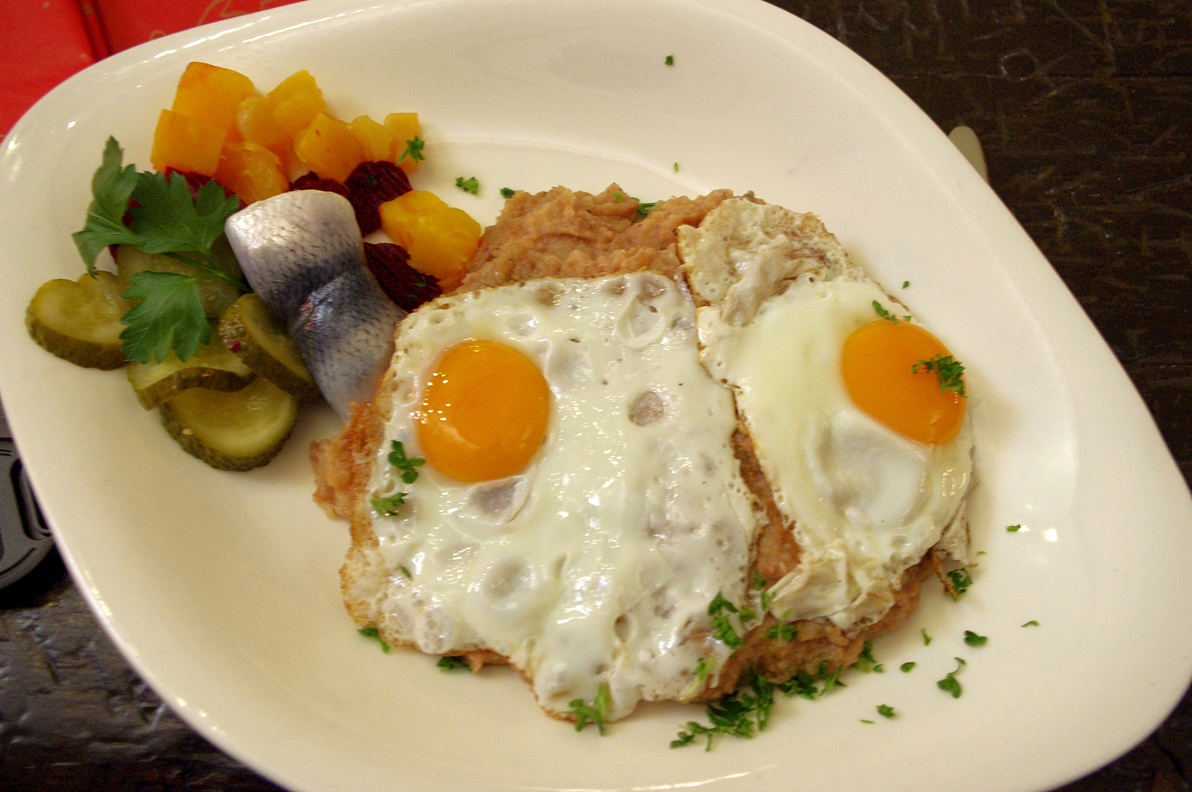 Labskaus in einem Lübecker Restaurant serviert mit Spiegelei und als Beilagen Hering (Rollmops), rote Beete, süß-saure Gurken und süß-saurer Kürbis.